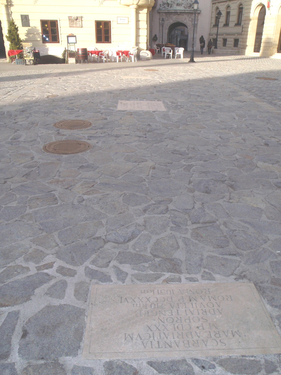 Sopron Fő tér Borostánykő út rekonstrukció